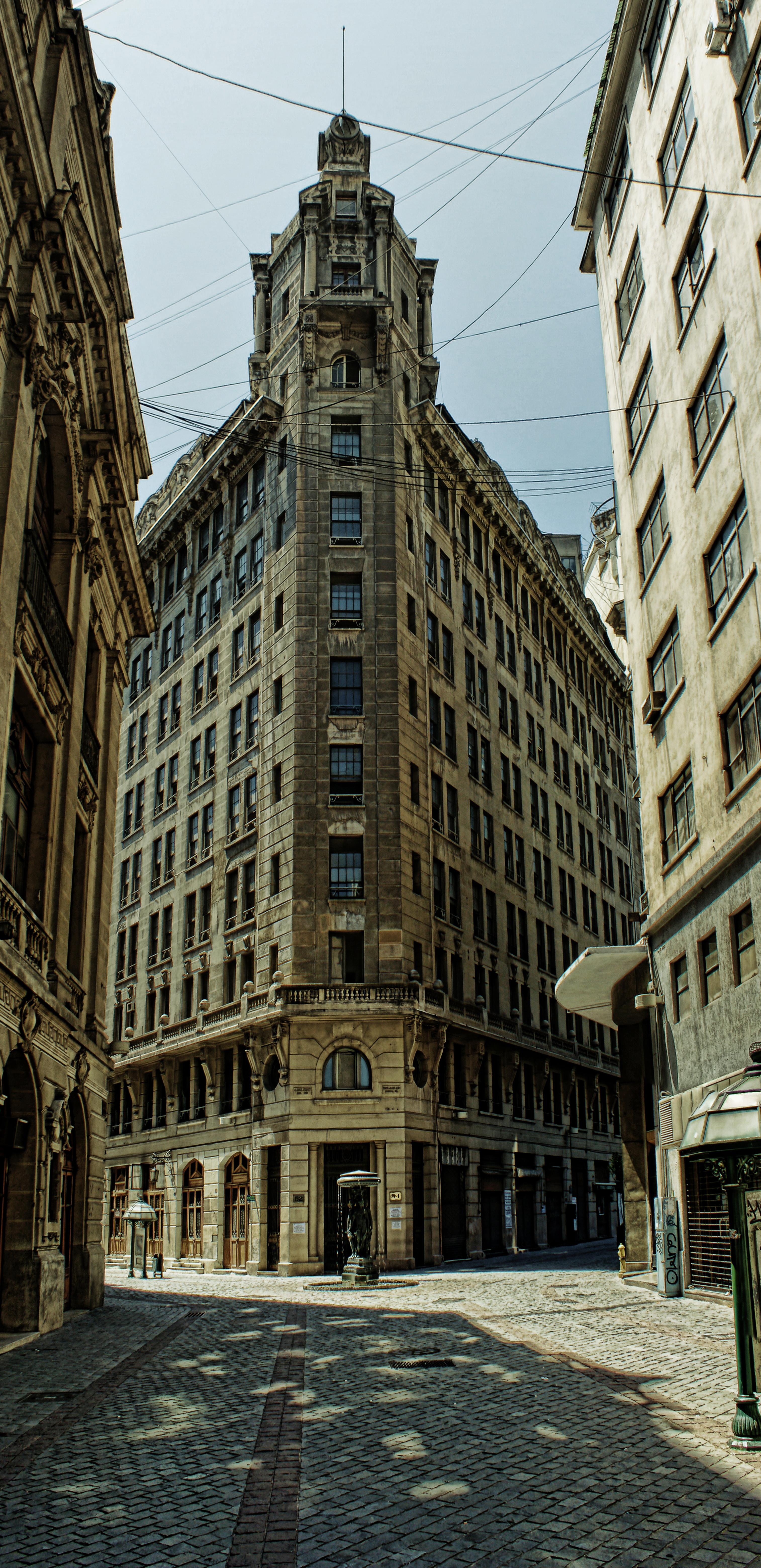 Sector calle Nueva York, La Bolsa y Club de la Unión This is a photo of a national monument in Chile: 214